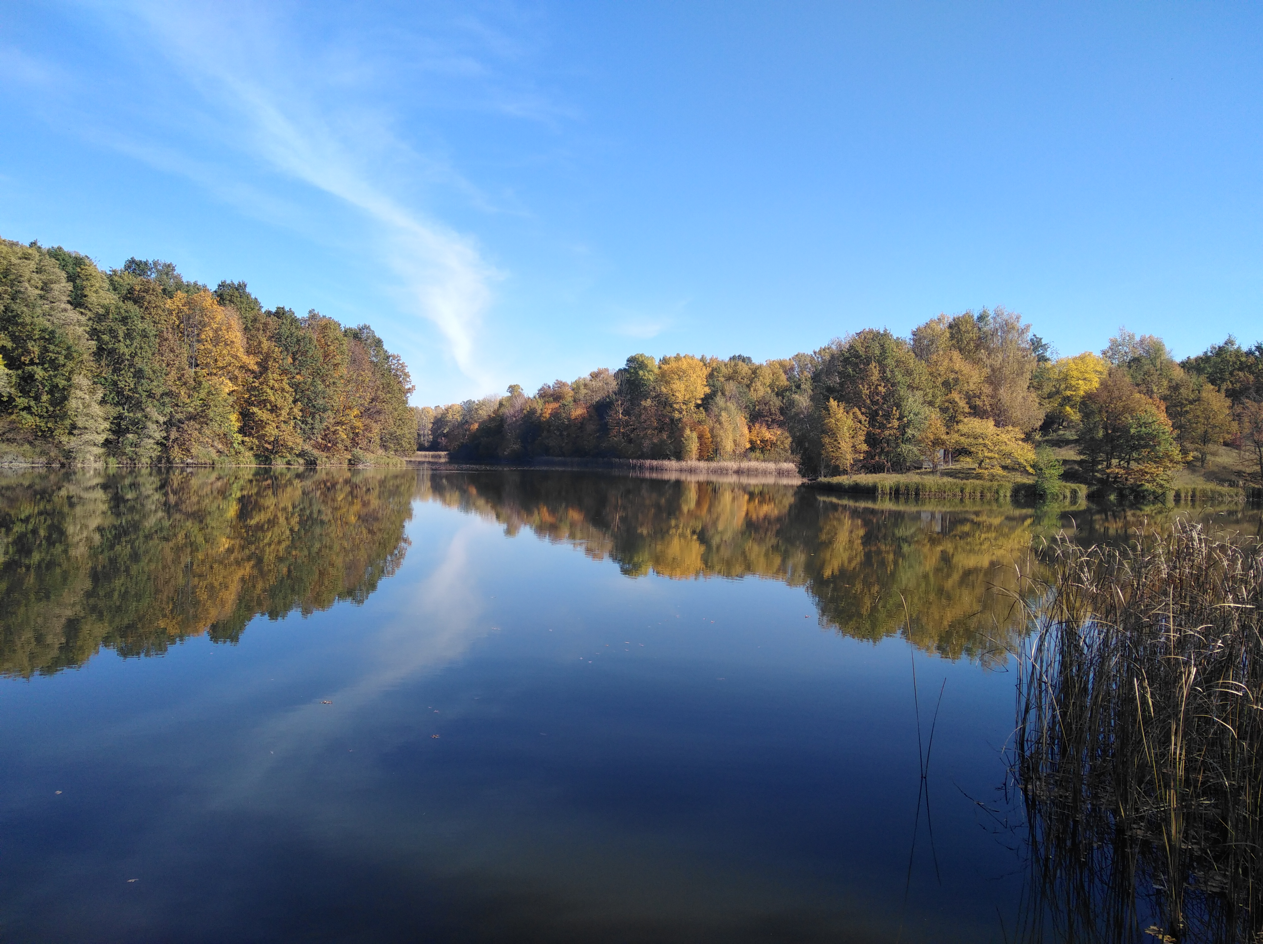 Пирятинський, Пирятинський р-н: в околицях м. Пирятин та сіл Грабарівка, Давидівка, Березова Рудка, Сасинівка, Гурбинці, Леляки, Усівка, Кейбалівка, Каплинці, Харківці, Дейманівка, Високе, Велика Круча, Повстин, Олександрівка